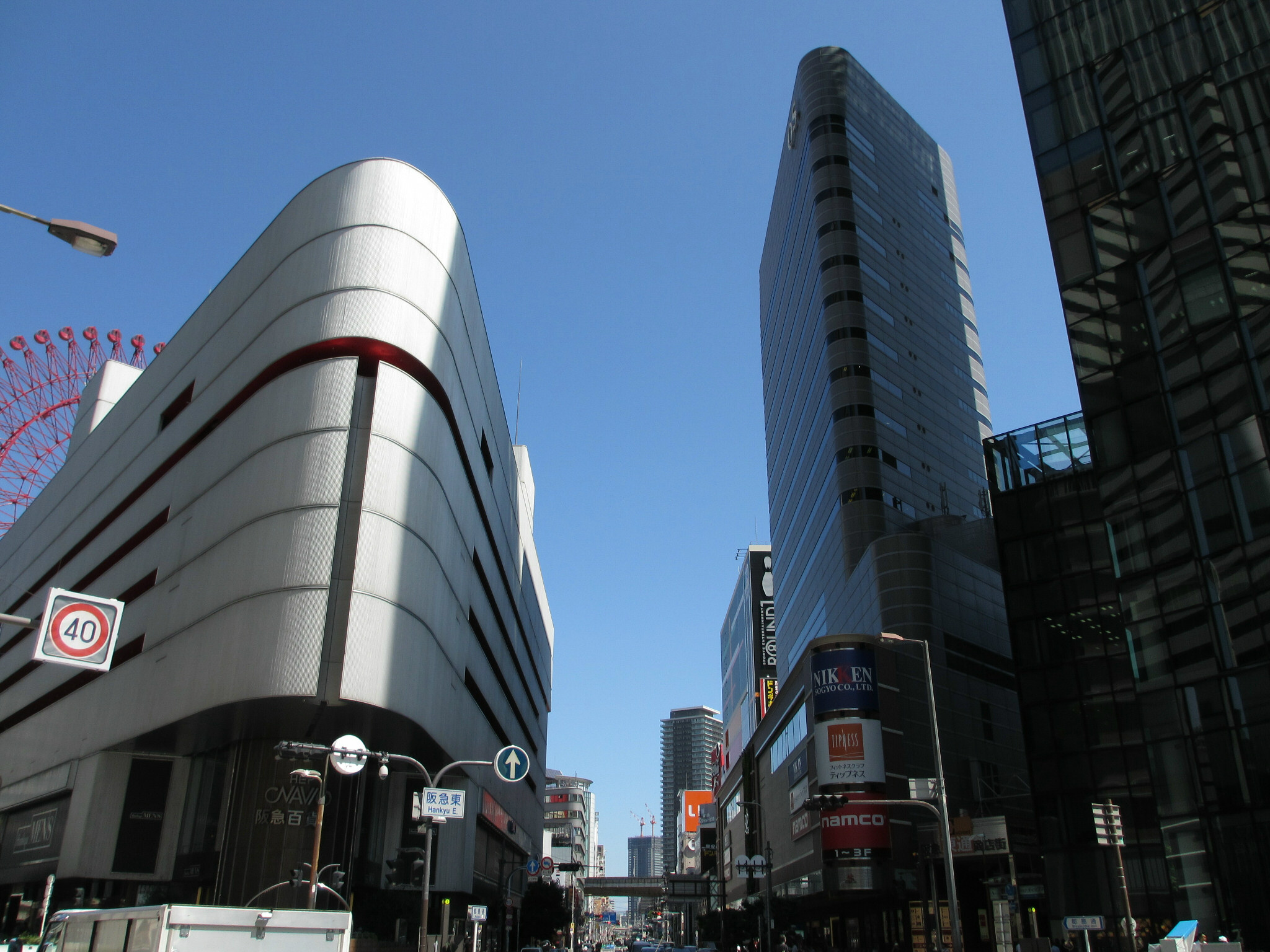 Umeda